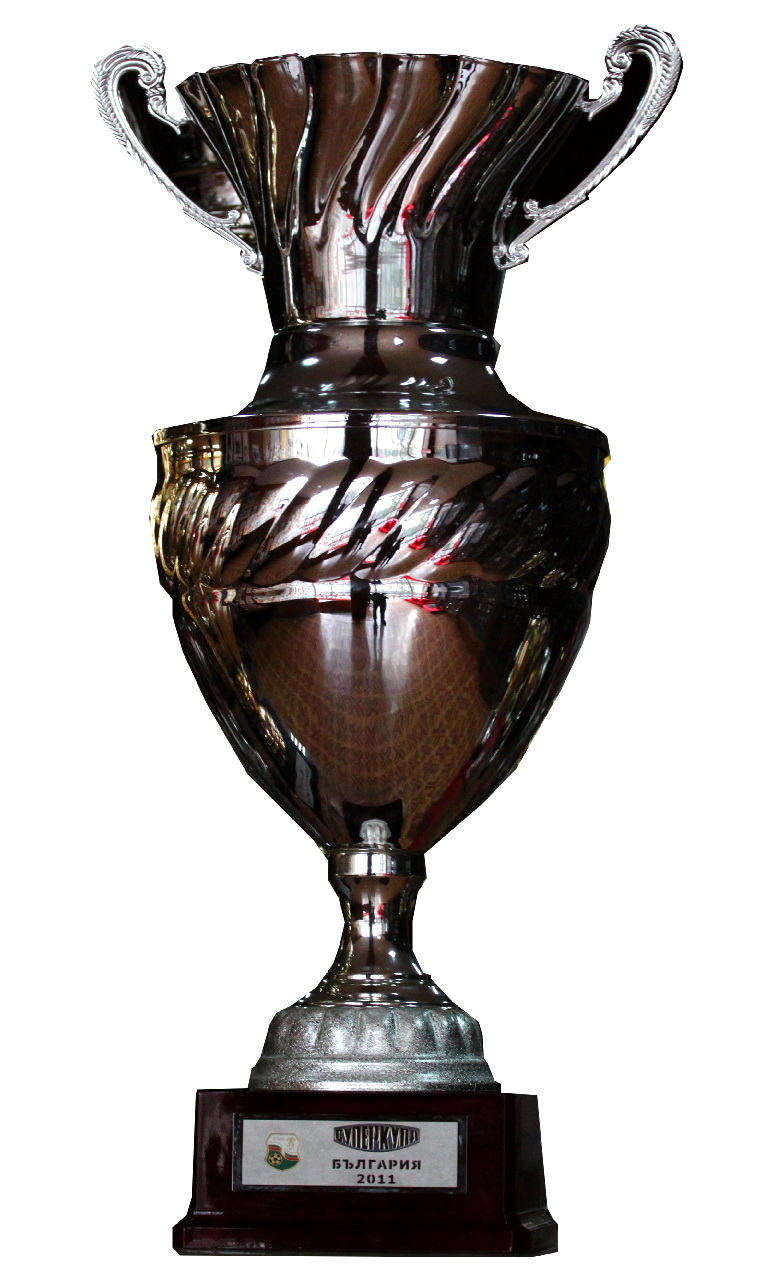 Суперкупа по футбол на България 2011.